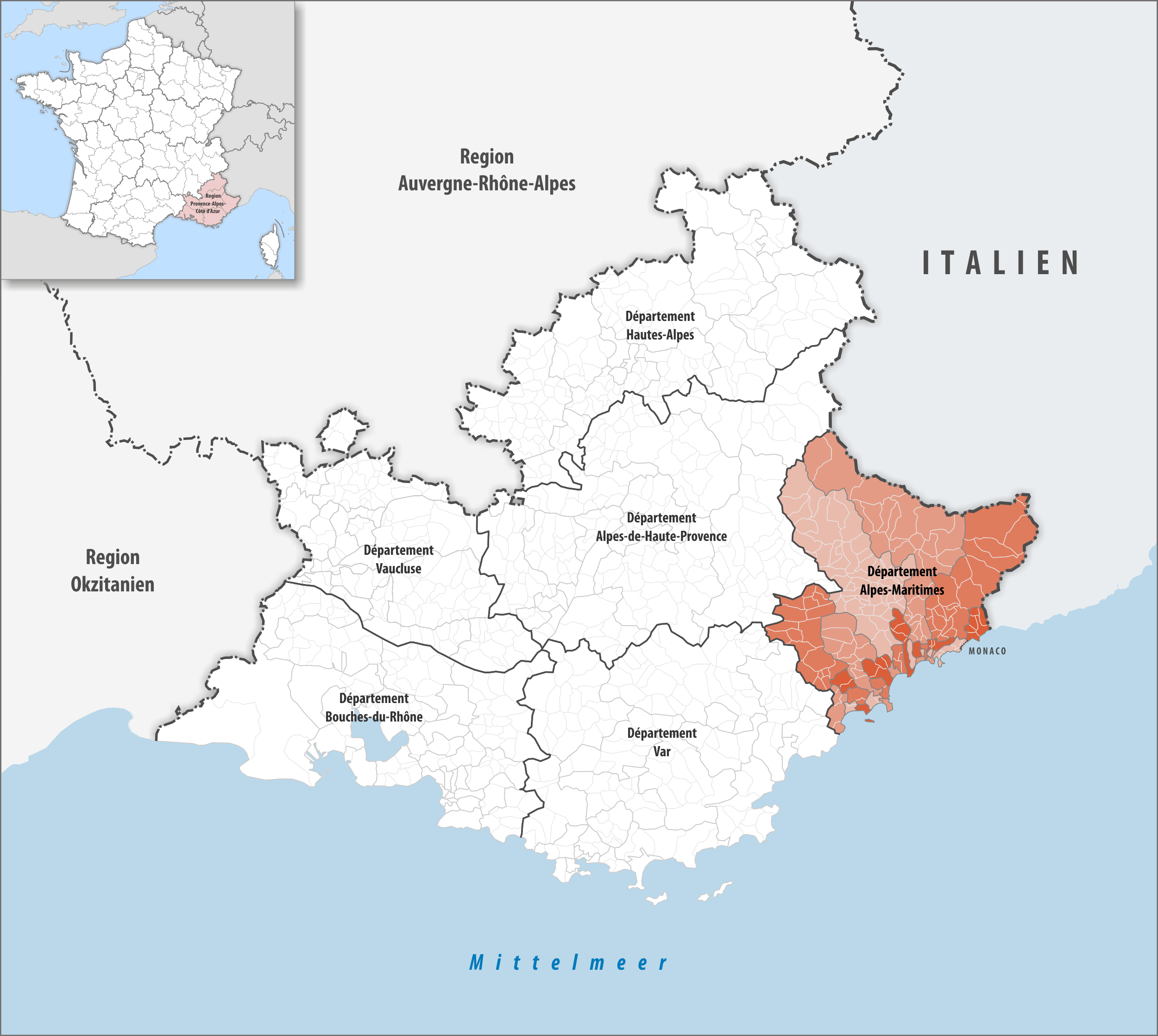 Lage des Departements Alpes-Maritimes